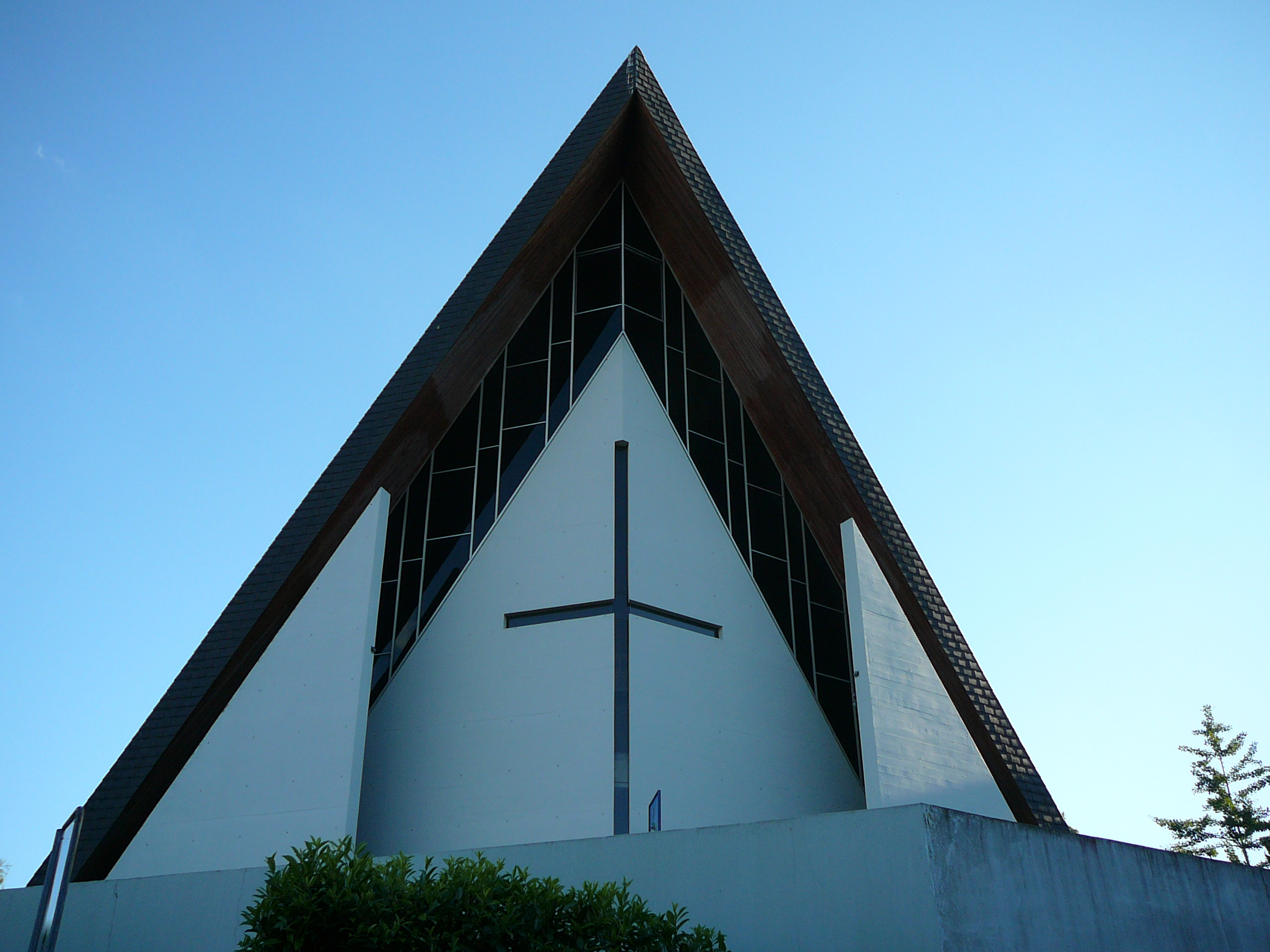 Römisch-katholische Pfarrkirche St. Paulus Dielsdorf, Frontseite